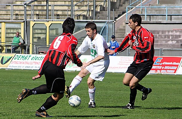 Fortitudo Cosenza vs Associazione Giovanile Nocerina 1910 2-4